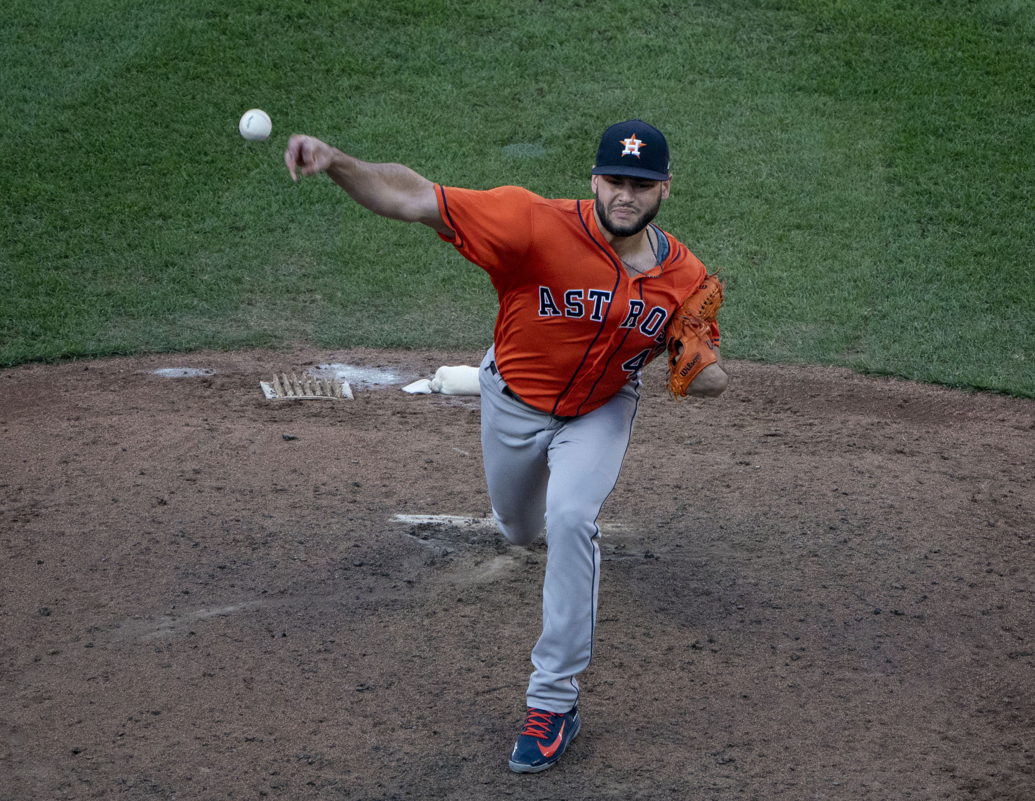 Astros at Orioles 09/30/18